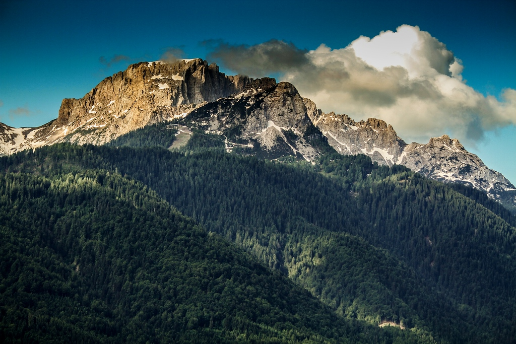 Kärnten: Blick vom Gailtal auf den Trogkofel (hinten) und den Zweikofel (2059 m)